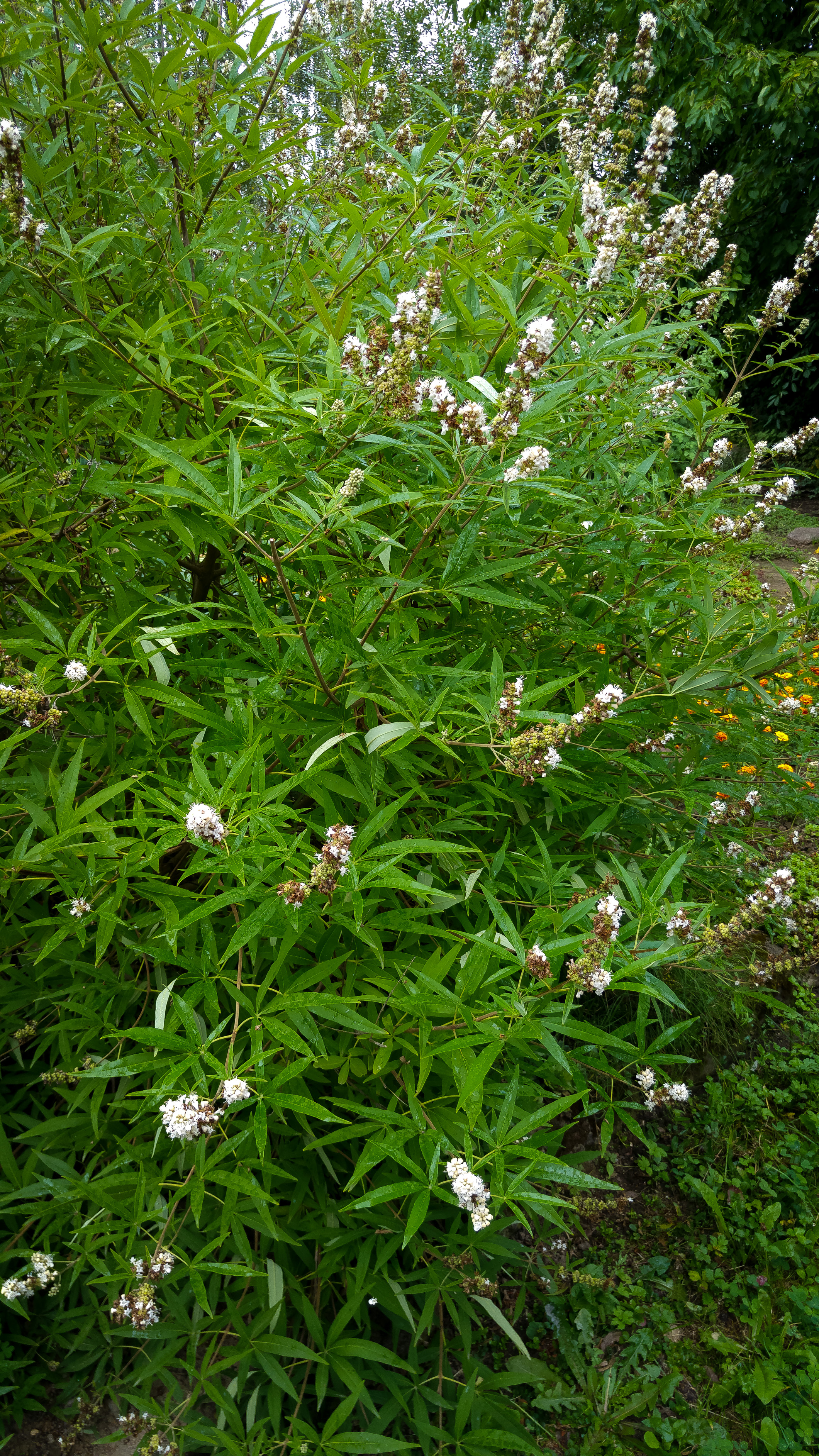 Der Mönchspfeffer, lat. Vitex agnus-castus